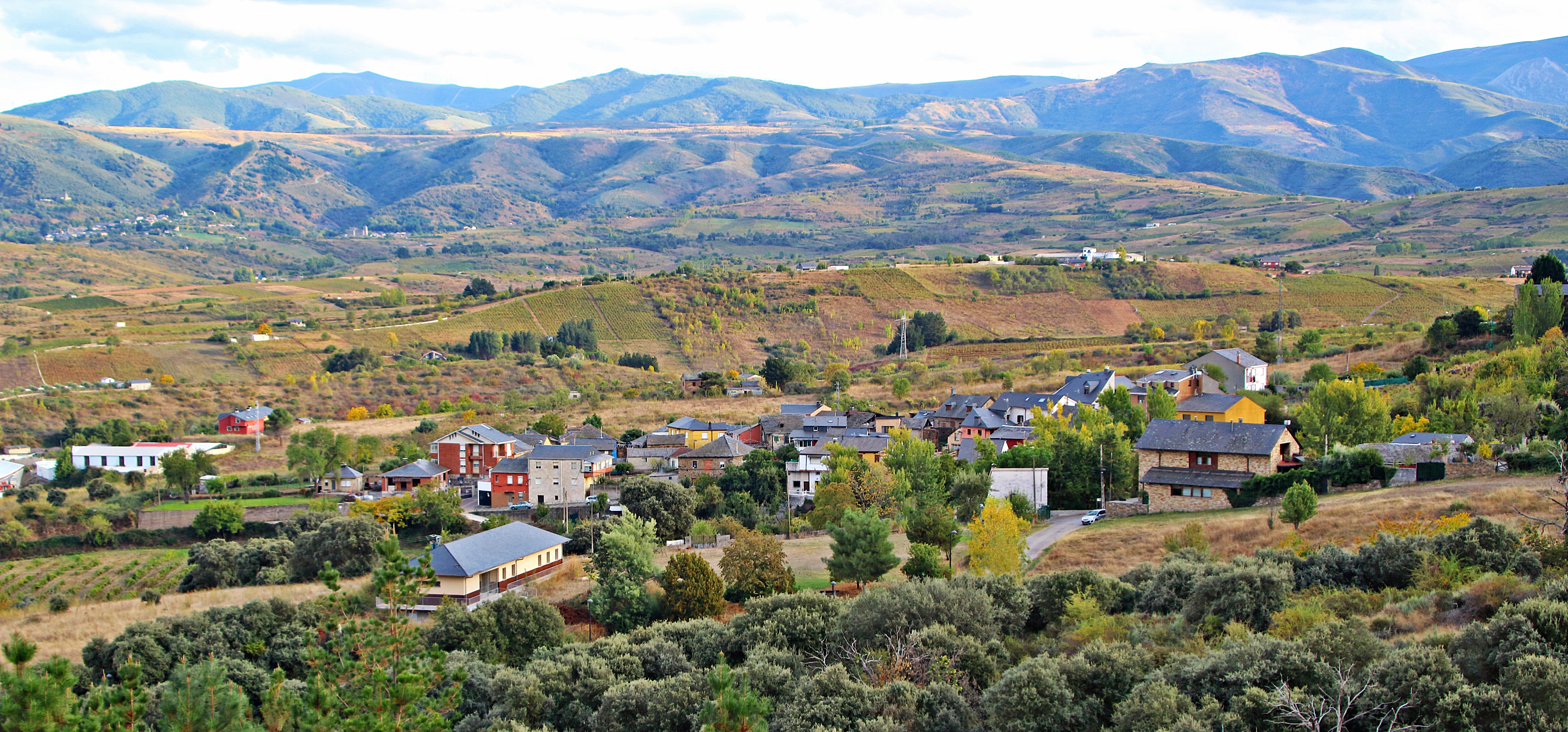 Localidad de Otero, Ayuntamiento de Ponferrada, comarca de El Bierzo, provincia de León.